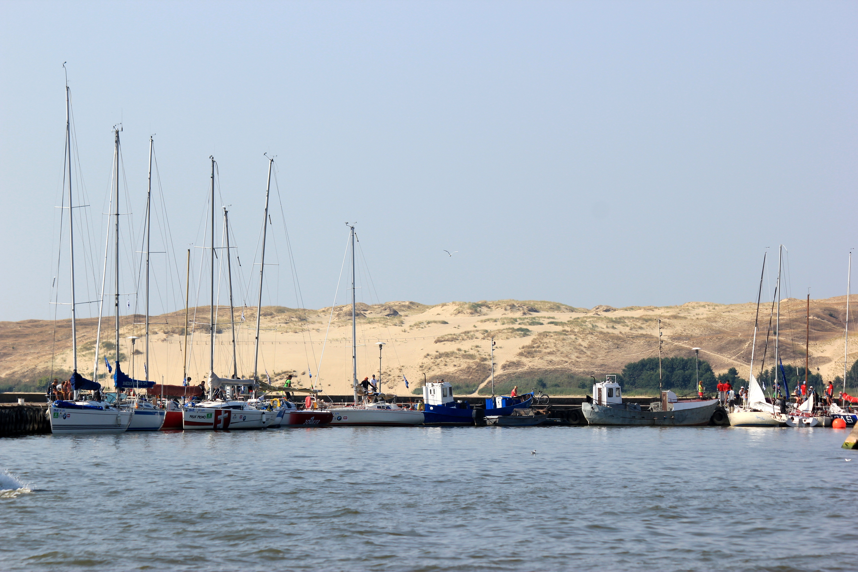 Dünen der Kurischen Nehrung bei Nida (Nidden), Litauen.